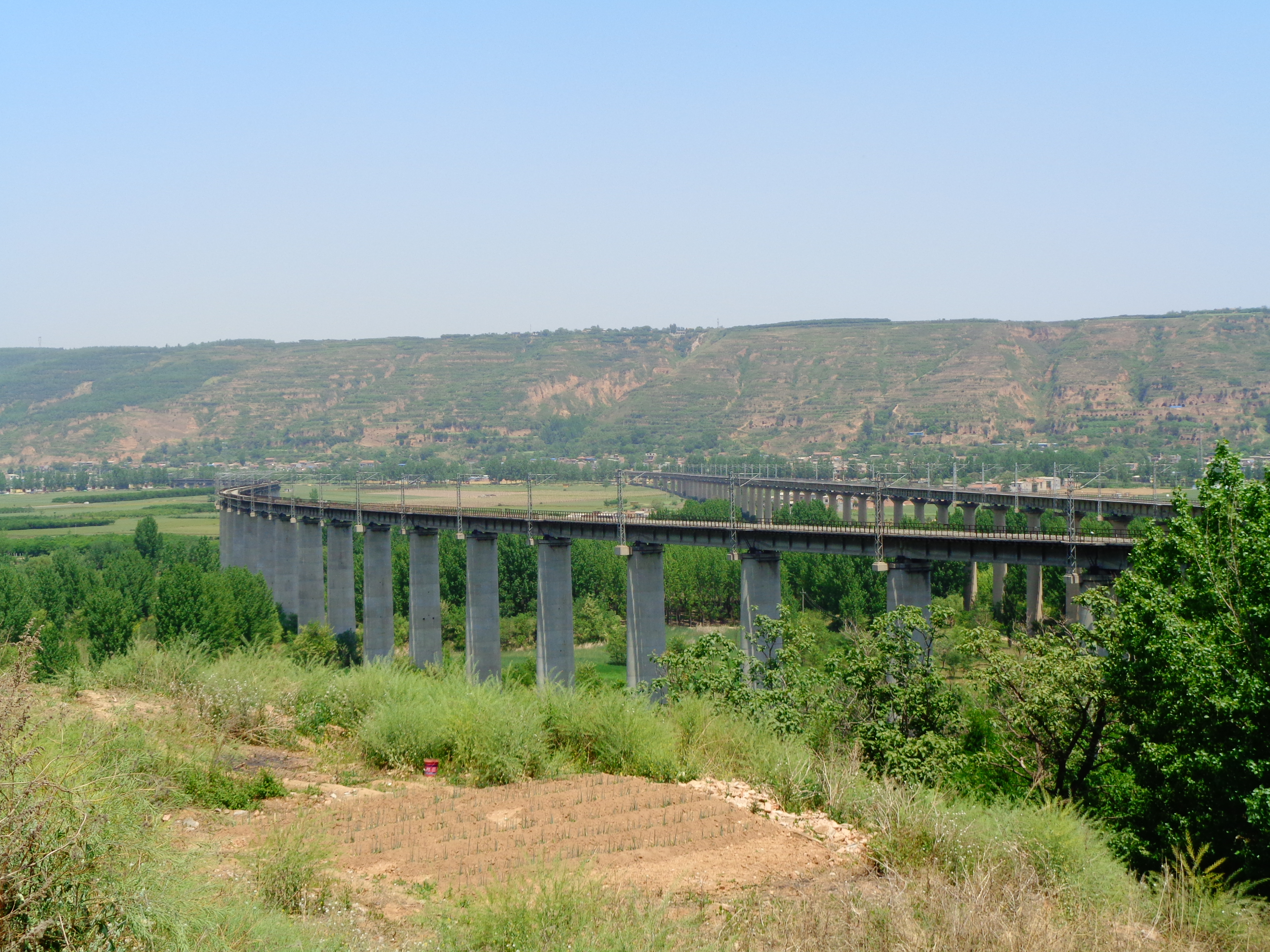 西安市长安区西康铁路浐河桥